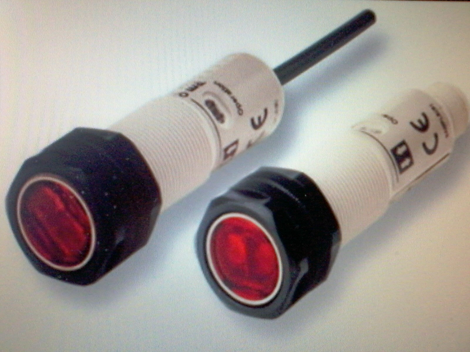 Знято мобілкою Самсунг